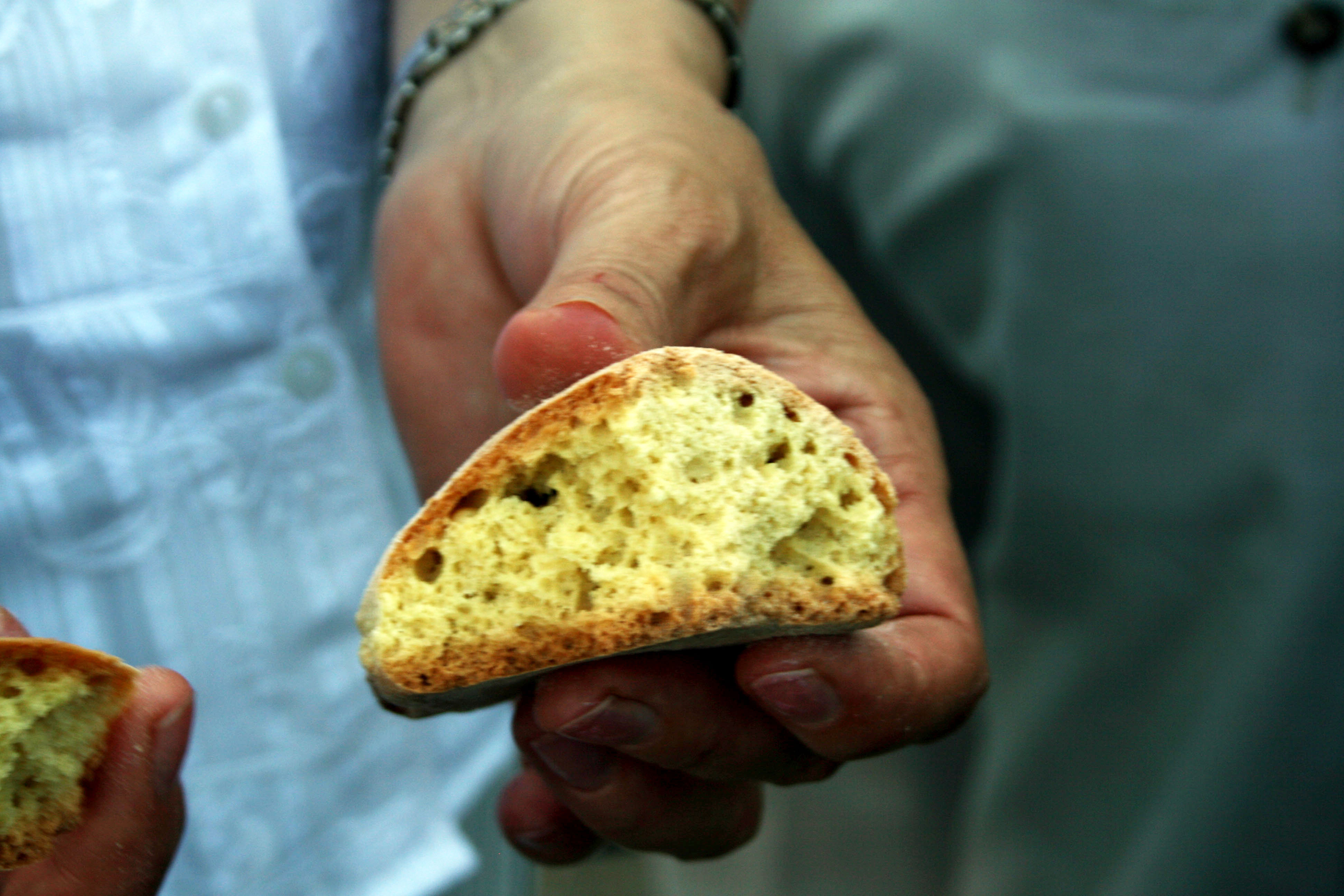 bollo típico del baile de bodas denominado “rosca” (bollo maimón)